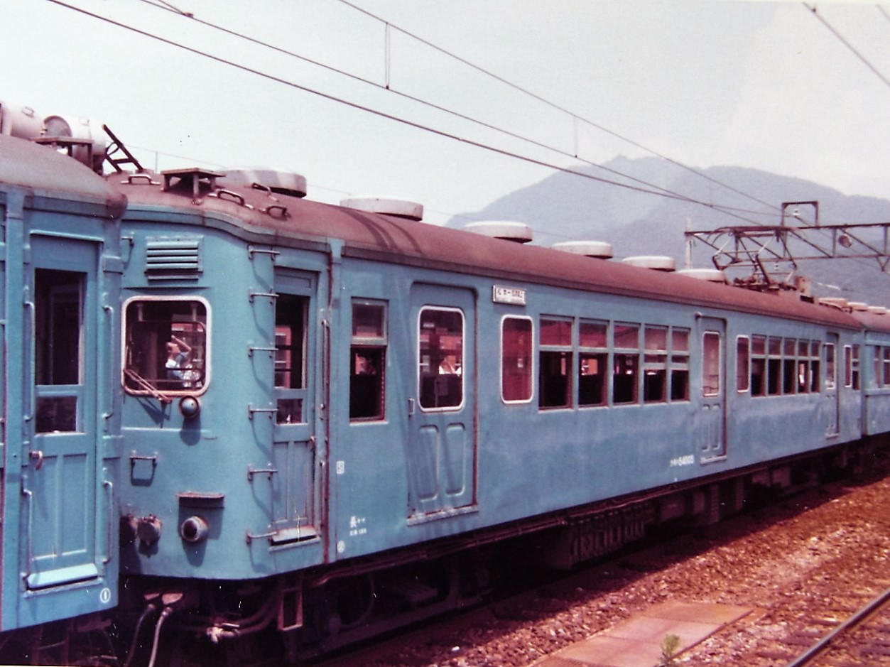 国鉄51系クモハ54005電車